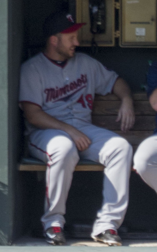 Kevin Jepsen